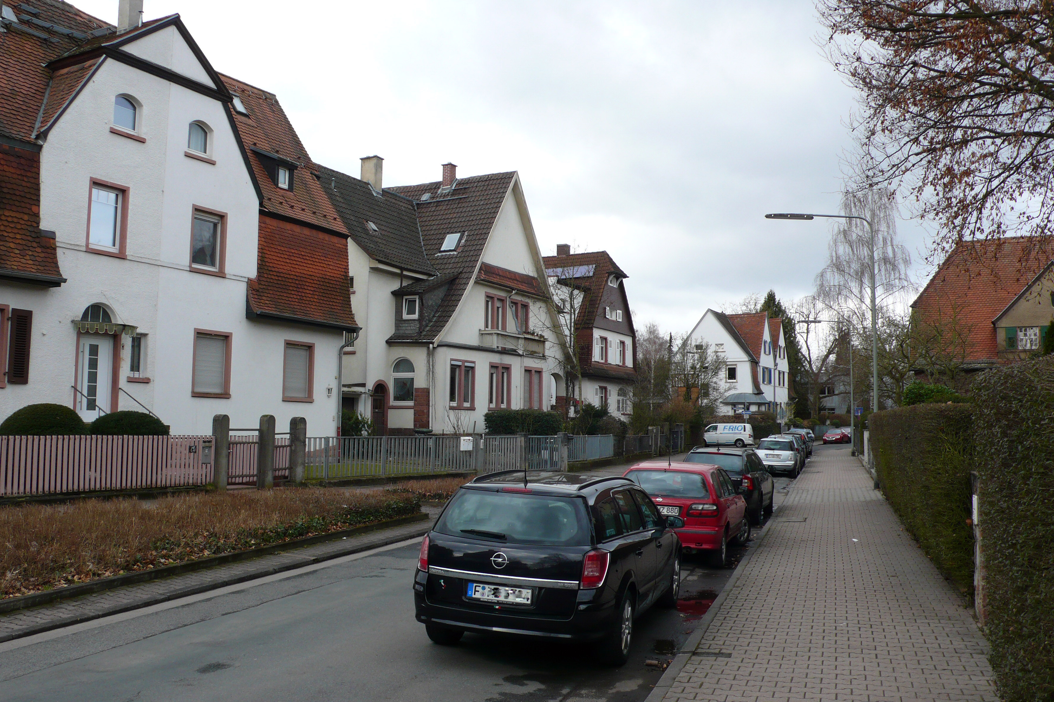 Blick in der Hohemarkstraße nach Westen